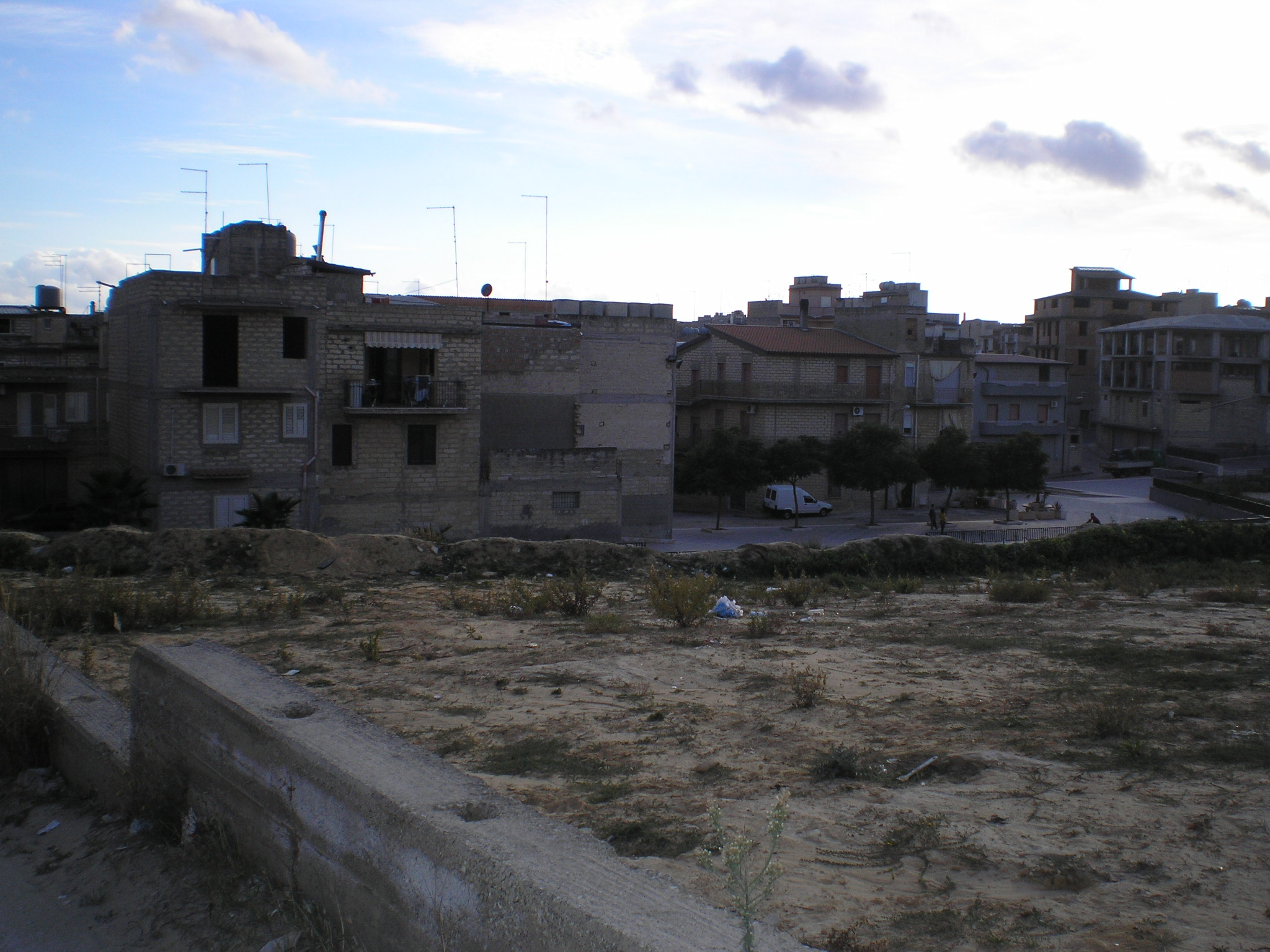 Foto scattata da Fabio Rinnone nel quartiere Sperlinga di Niscemi